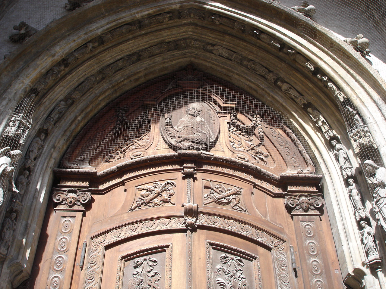 Das Donatusportal an der Frauenkirche München, von Ignaz Günther (1772).